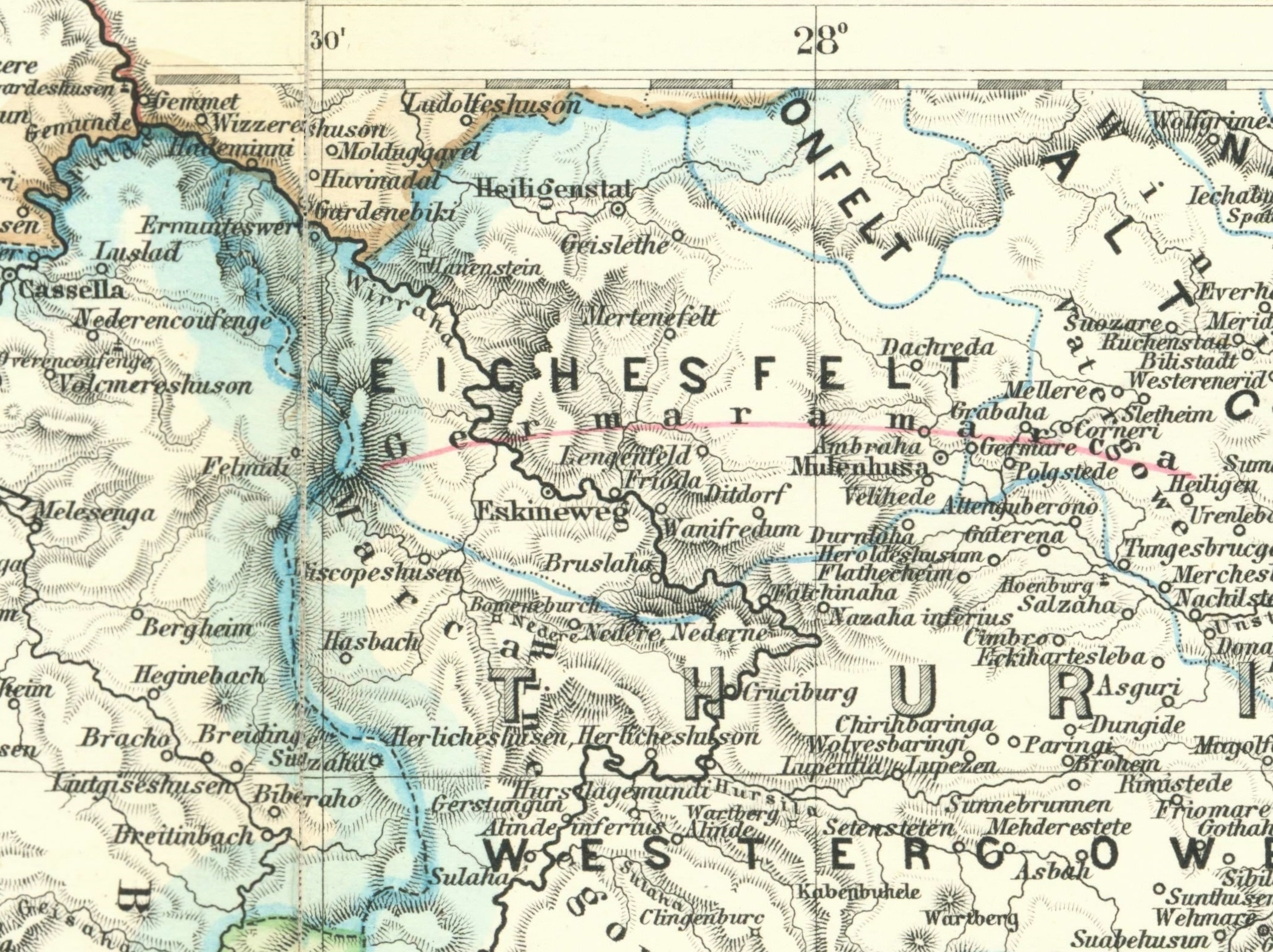 Deutschlands Gaue IV: Südliches Thüringen, Franken: Kartenausschnitt südliches Eichsfeld, Westthüringen